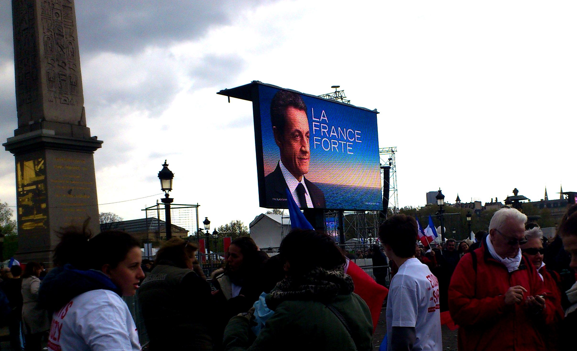 Une semaine avant le premier tour de la présidentielle, le 15 avril 2012, Nicolas Sarkozy a tenu un meeting en plein air sur la place de la Concorde, là même où il avait célébré sa victoire en 2007.